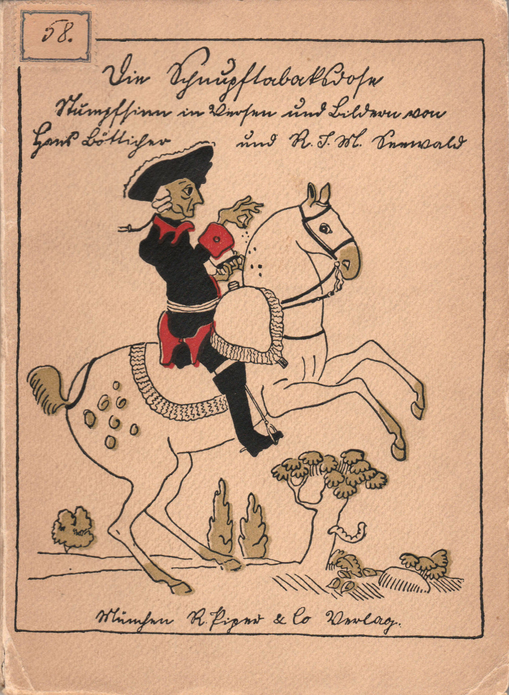 Scan Buchdeckel der Originalausgabe "Die Schnupftabaksdose" von Joachim Ringelnatz erschienen im Piper-Verlag 1912